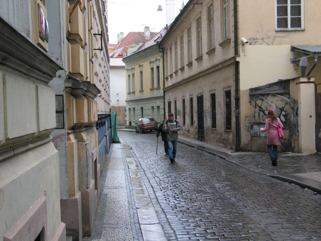 Praha, Nové Město, Ostrovní ulice.